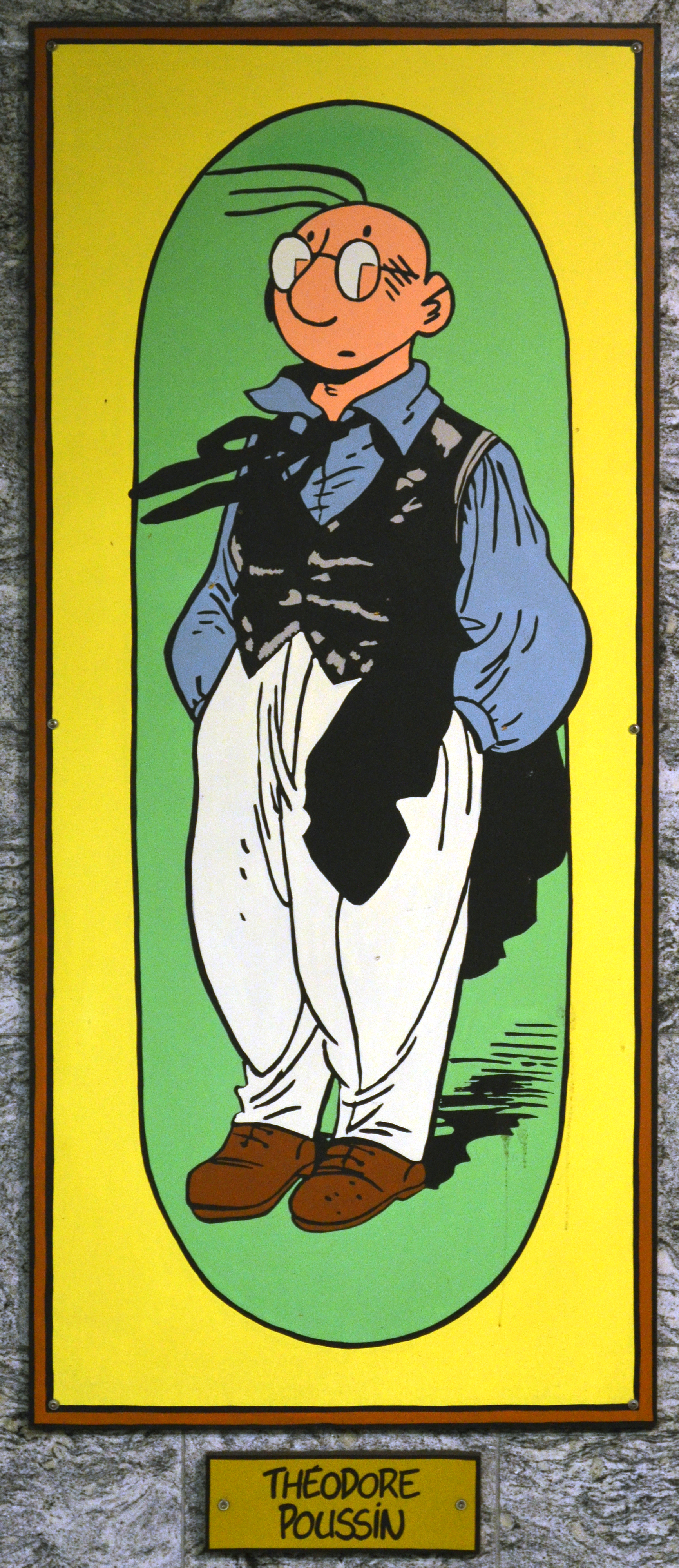 Charleroi (Belgique) - Station Janson du métro léger. Théodore Poussin.